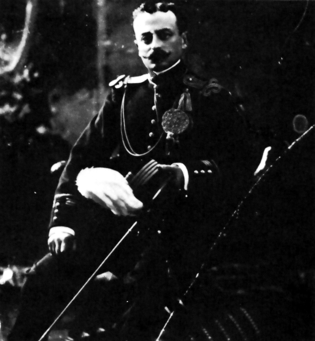 Óscar R. Benavides, presidente de la Junta de Gobierno del Perú de 1914 a 1915 y nuevamente entre 1933-1936